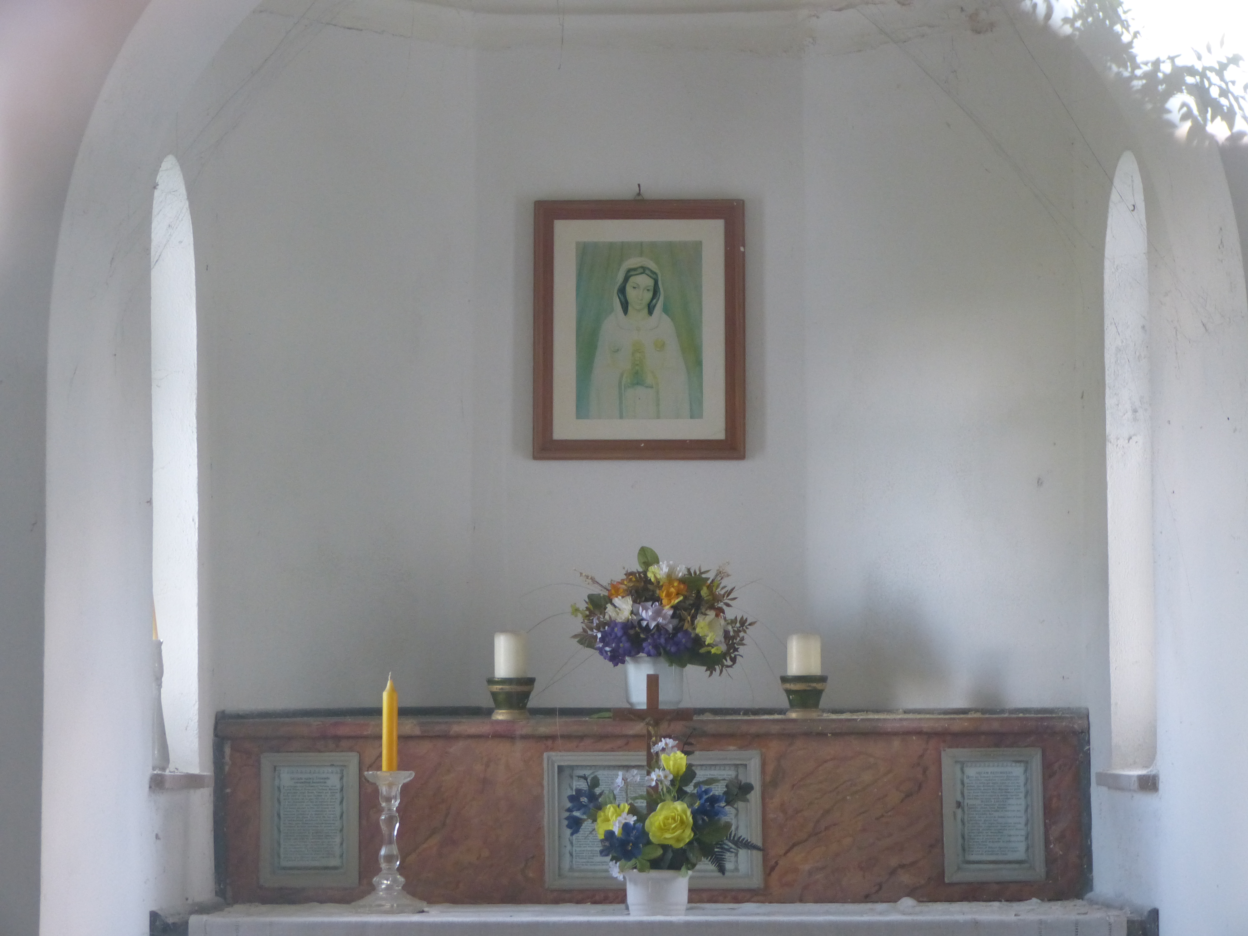 Feldkapelle bei Mindelheim, Landkreis Unterallgäu, Bayern